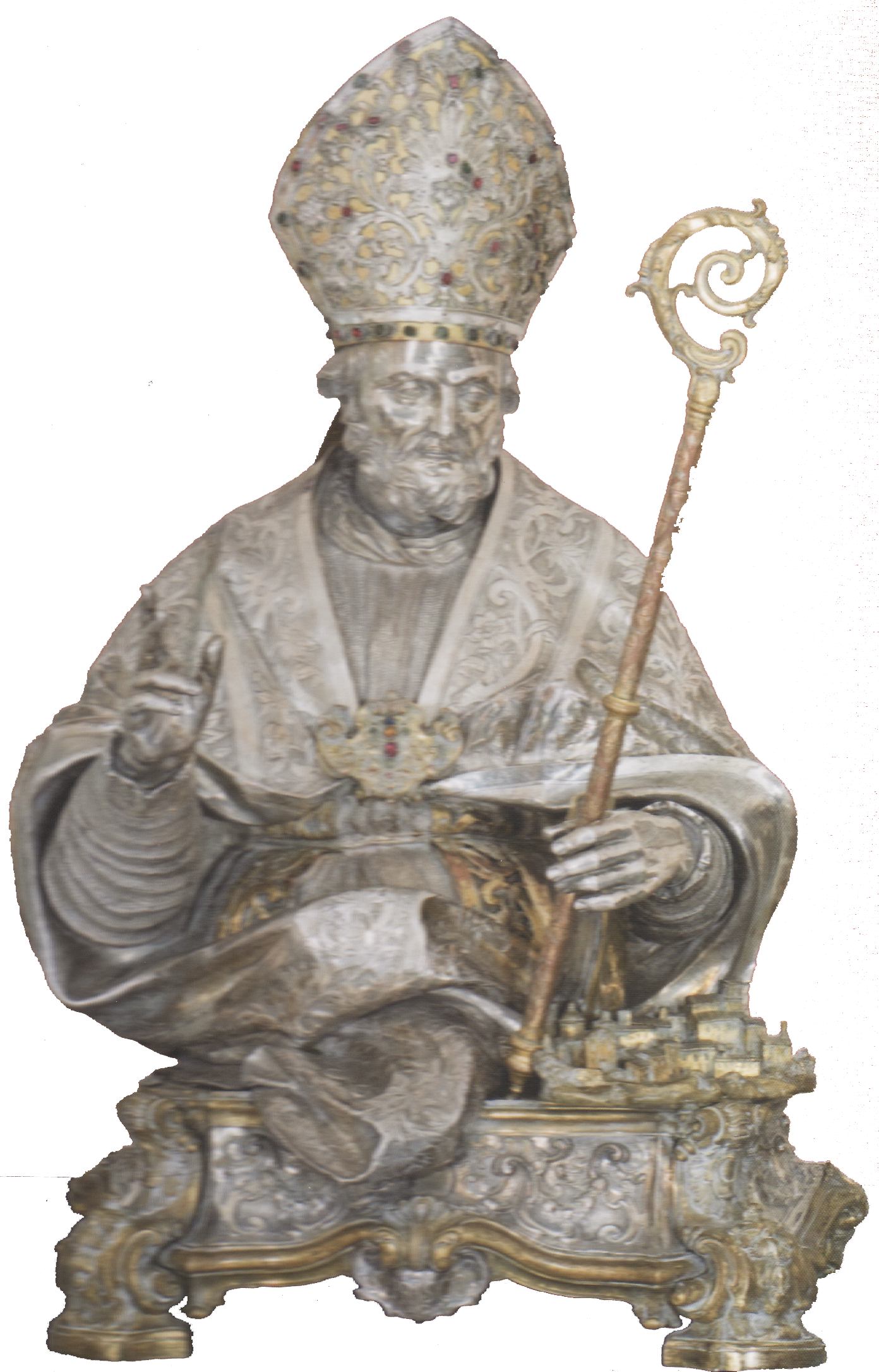 Busto argenteo di San Prisco, Museo Diocesano San Prisco, Nocera Inferiore